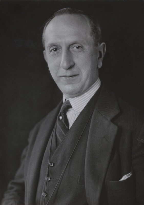 Isiadore Salmon